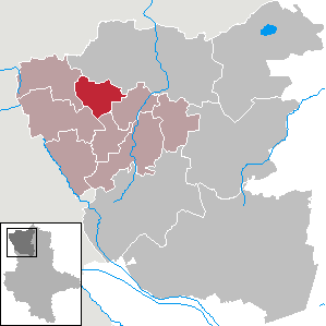 (Original text: Wallstawe im Landkreis Salzwedel)